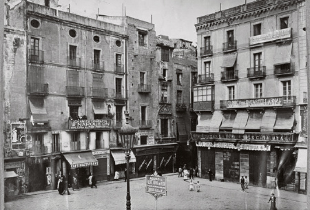 Plaça de l'Angel (Barcelona-Catalunya). Lateral de la plaça que va ser enderrocat en 1907 per a fer la Via Laietana. Al primer pis de l'edifici central hi apareix l'estudi dels fotògrafs Napoleon.